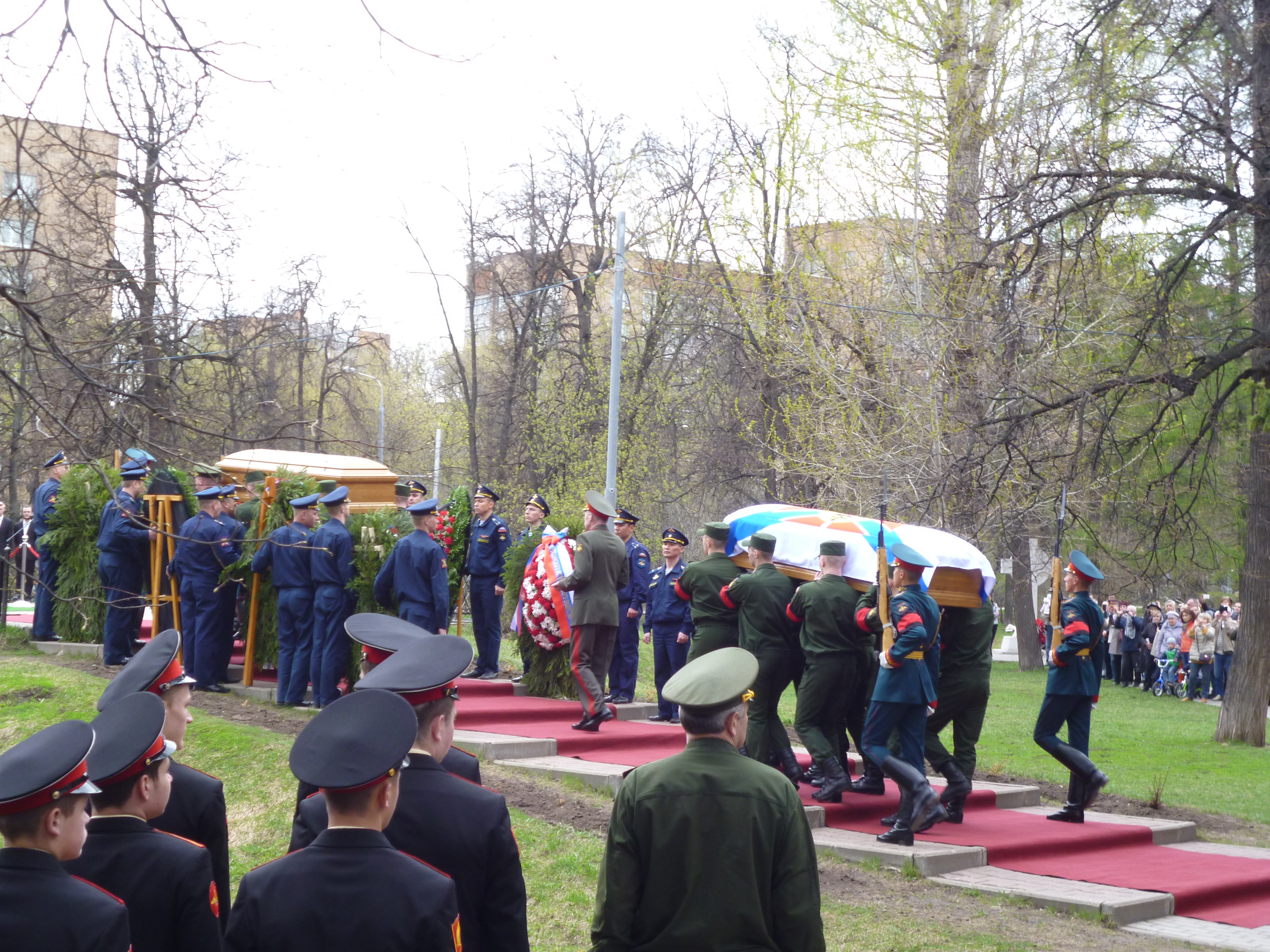 Церемония перезахоронения останков великого князя Николая Николаевича Младшего и его супруги великой княгини Анастасии Николаевны.